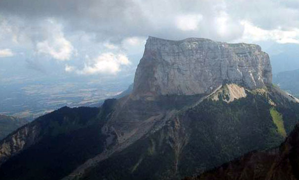 Mont Aiguille im Vercors ahasoso